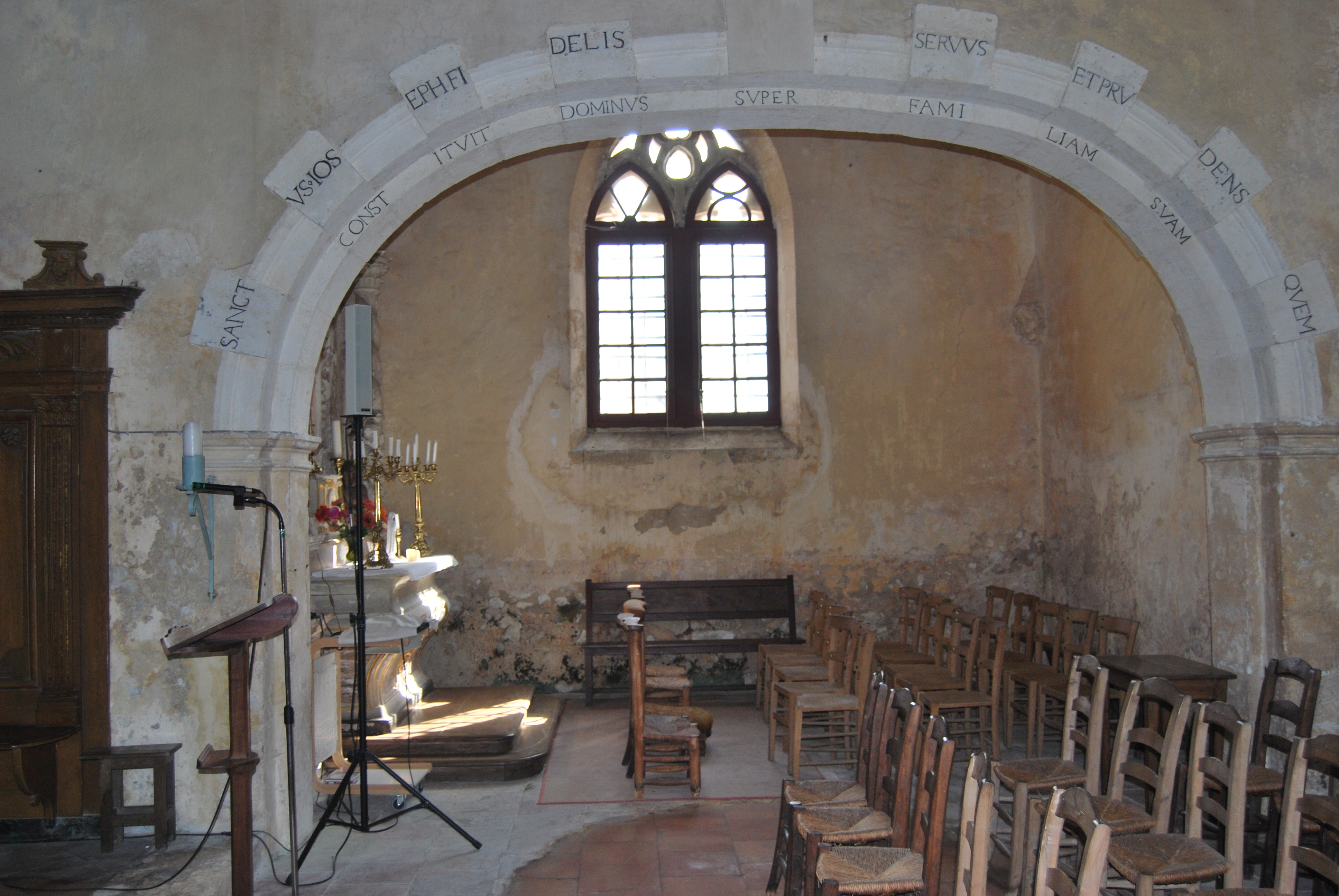 Église Saint-Jean-Baptiste de Cameyrac .